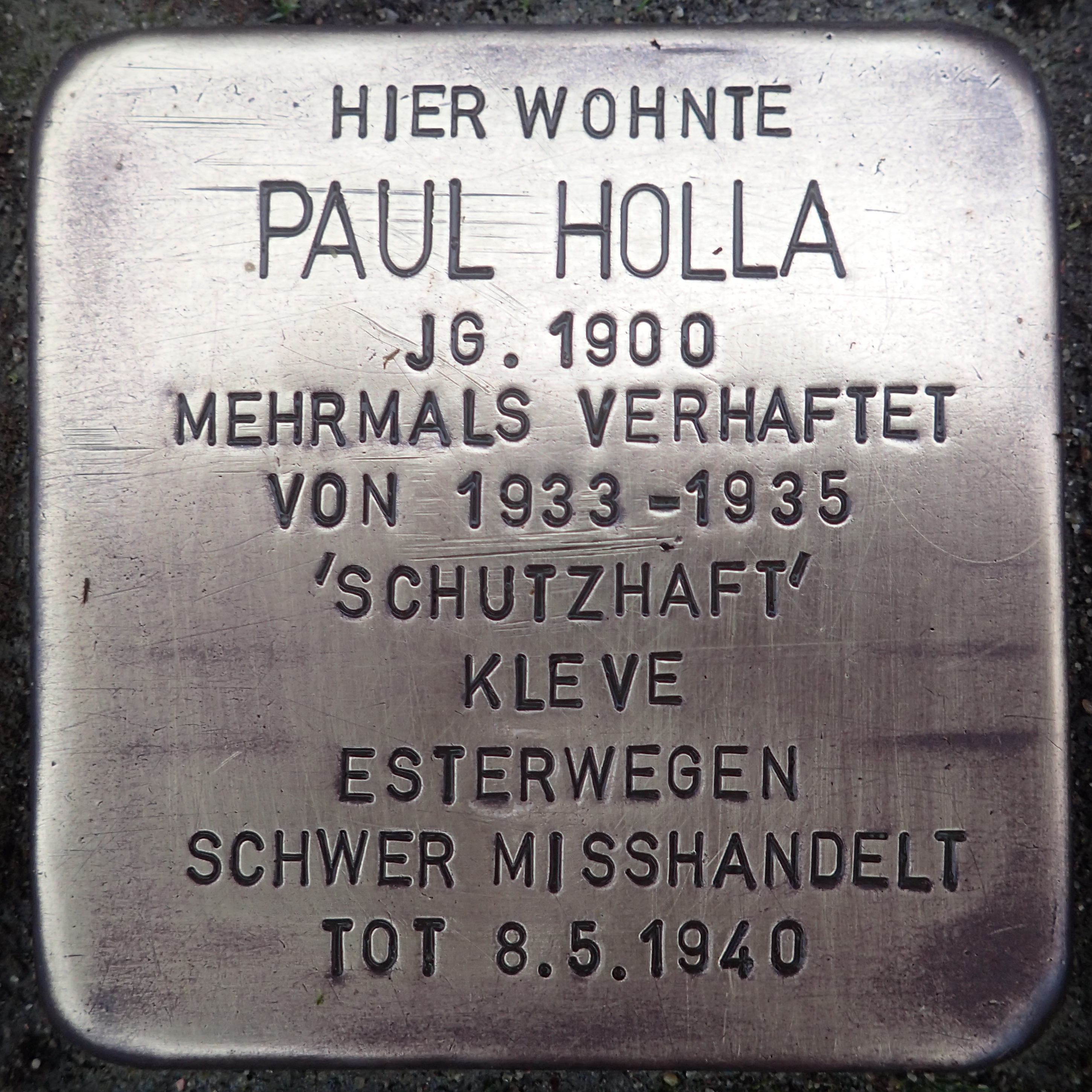 Stolperstein Geldern Herzogstraße 2 Paul Holla